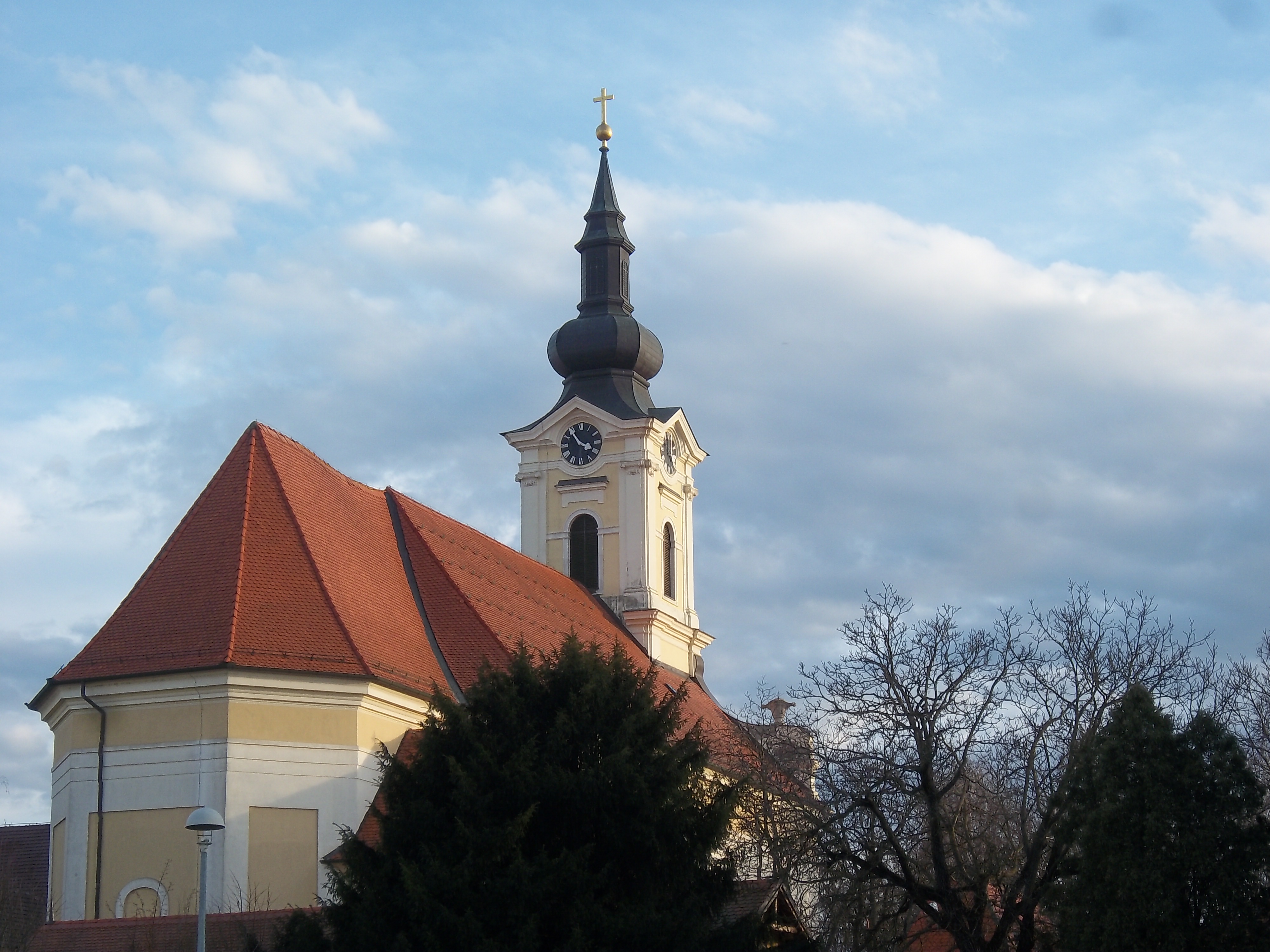 Srpskohrvatski / српскохрватски: Rimokatolička crkva u Vinkovcima u istočnoj Hrvatskoj.